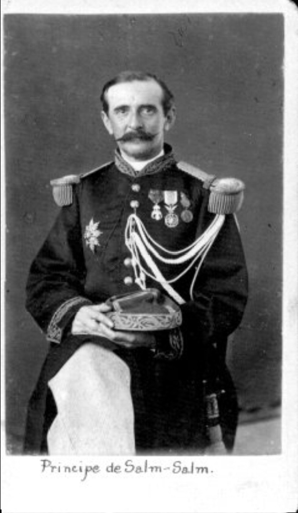 Felix Salm-Salm (1828–1870) in Mexican uniform